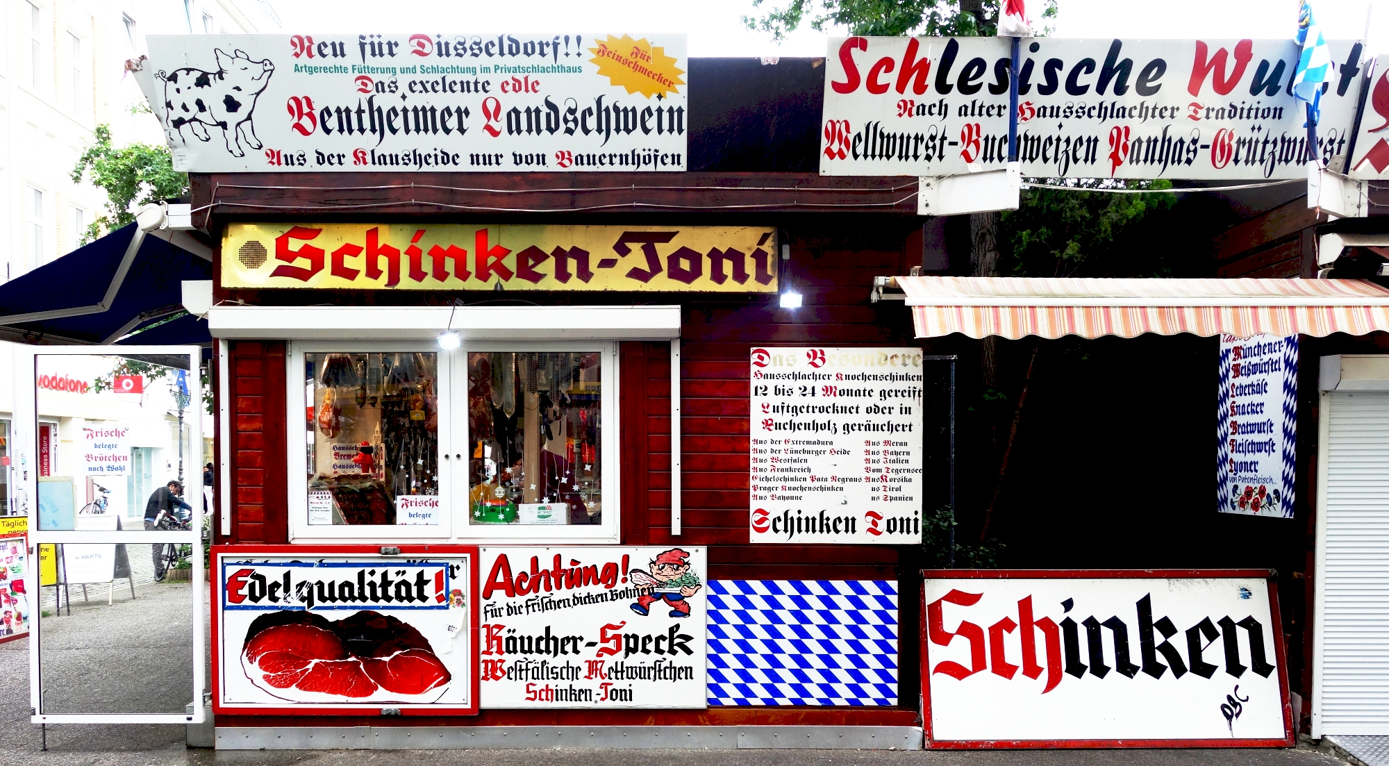 Schinken-Toni, Düsseldorf Markt Carlsplatz. Juli 2020, Deutschland